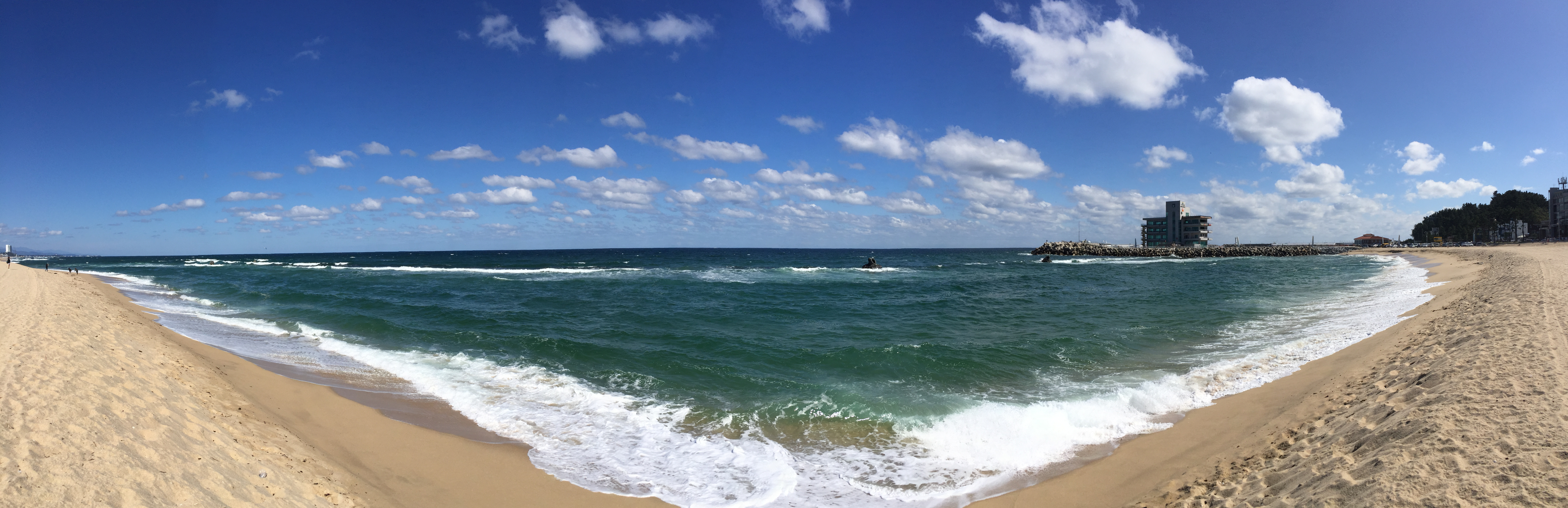 최광모 촬영 사진